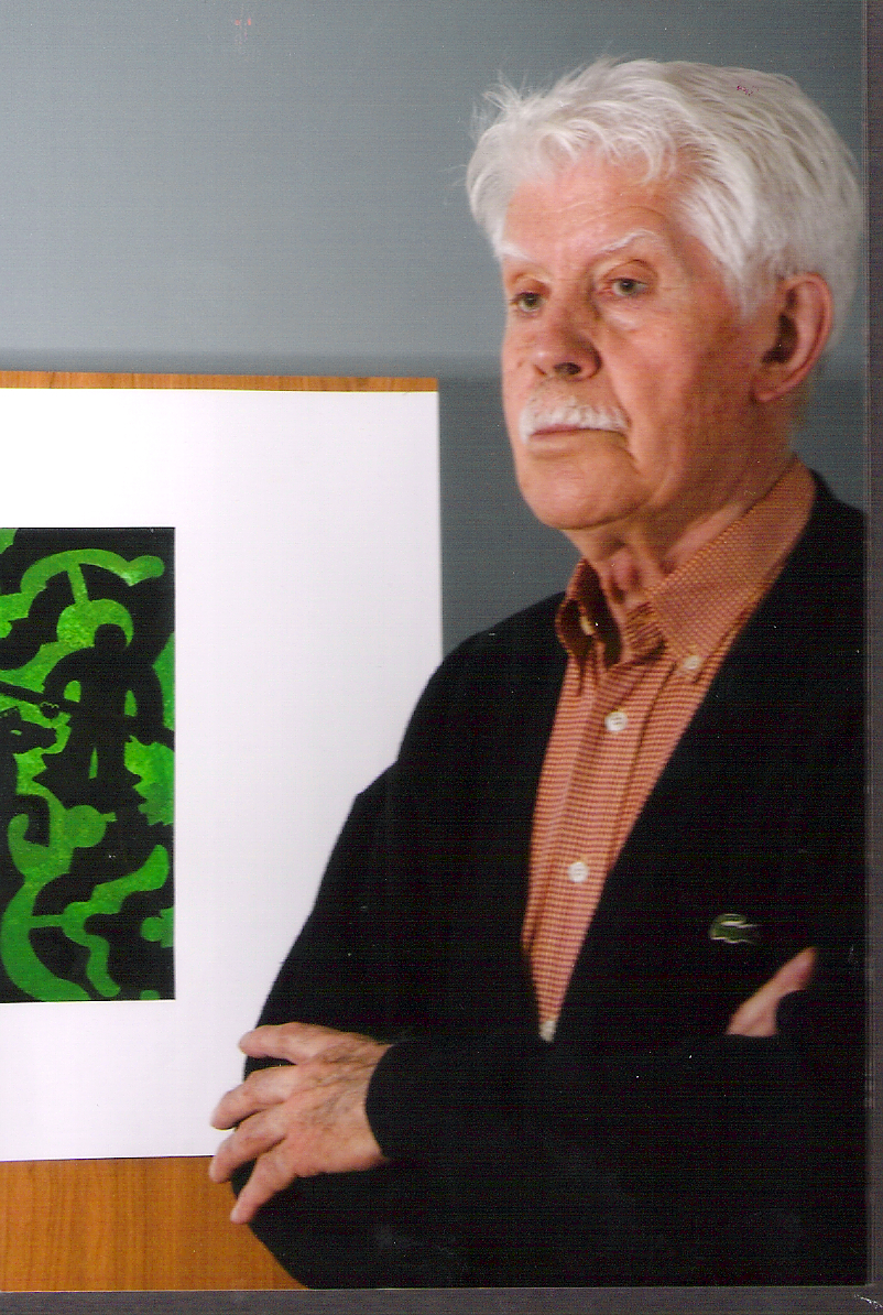 Retrato Julio Garcia de la Peña